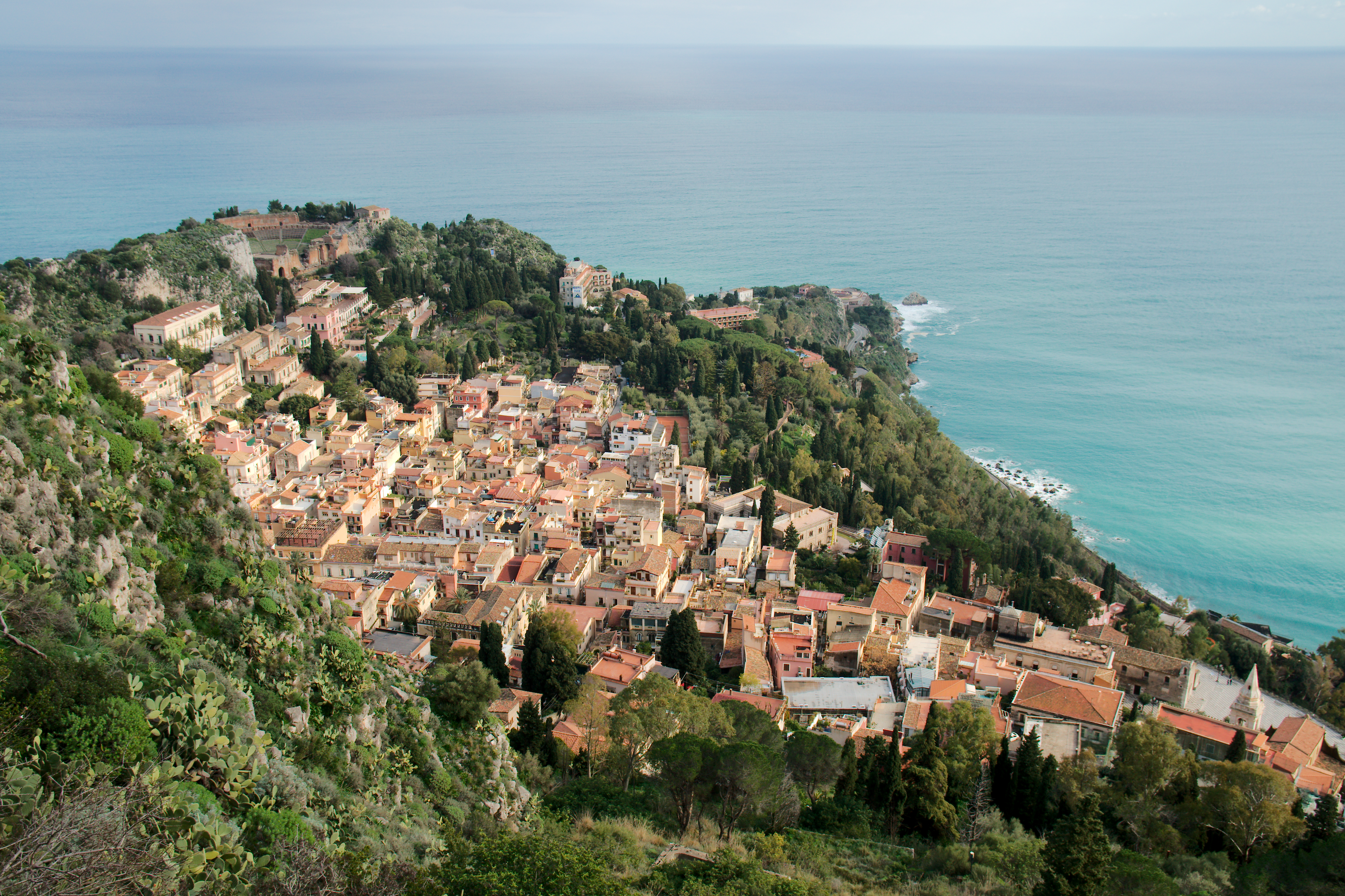 Taormina